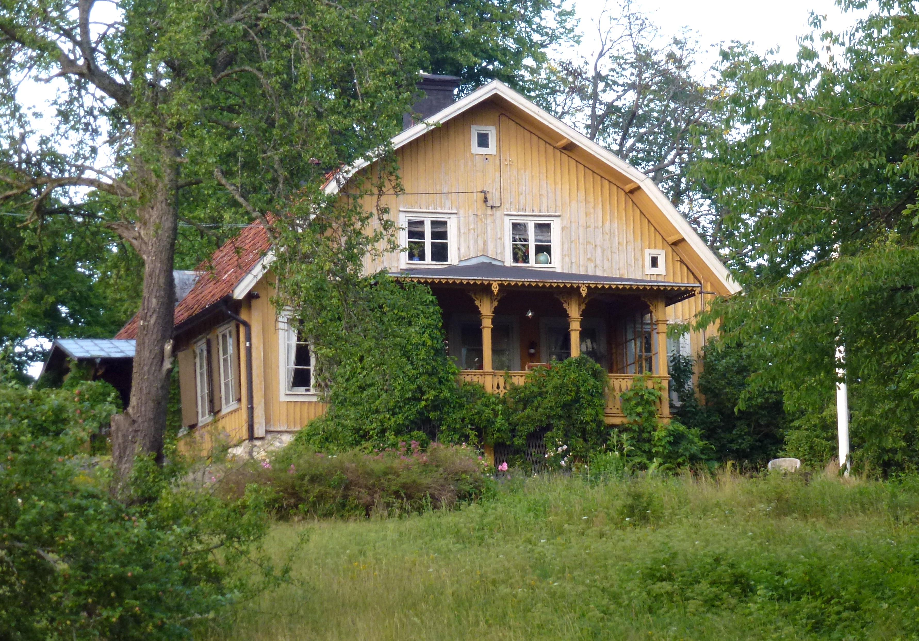 Tullgarns slott "Bellevue"